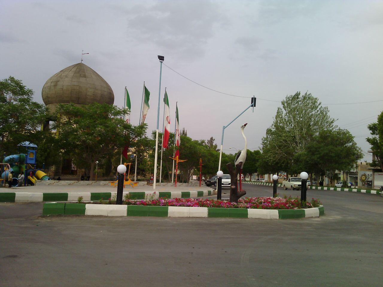 بوستان و مقبره شهدای گمنام شهر کشکوئیه